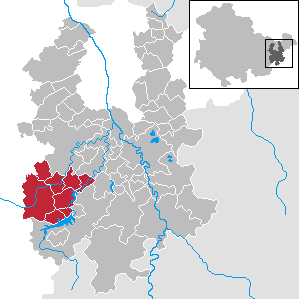 ehemalige Verwaltungsgemeinschaft Auma-Weidatal im Landkreis Greiz, Thüringen